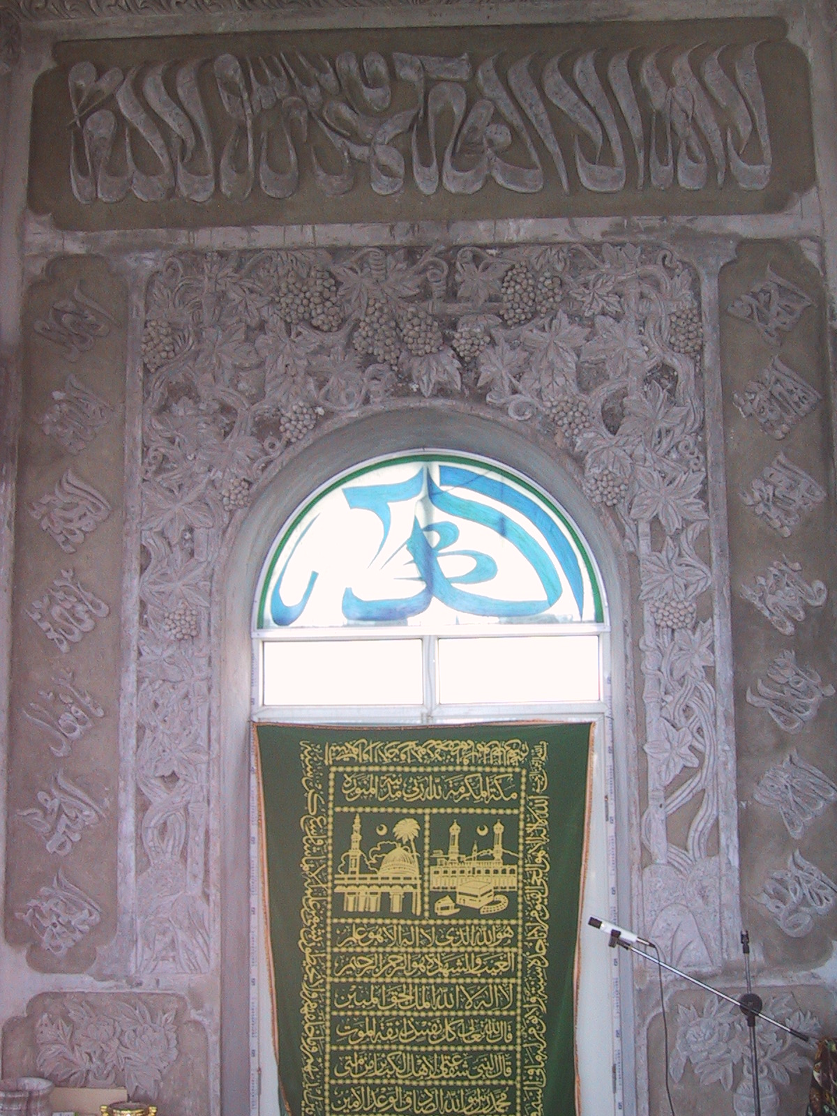 Linxia (simplified